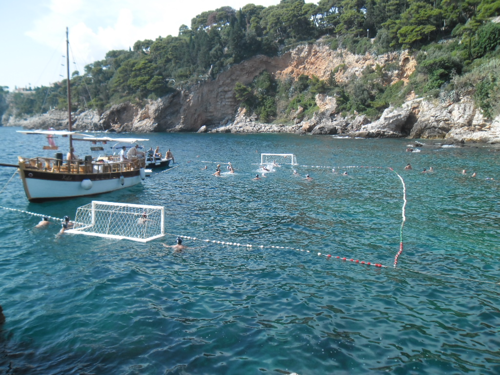 utakmica Divlje lige na Dančama, 25. srpnja 2014.